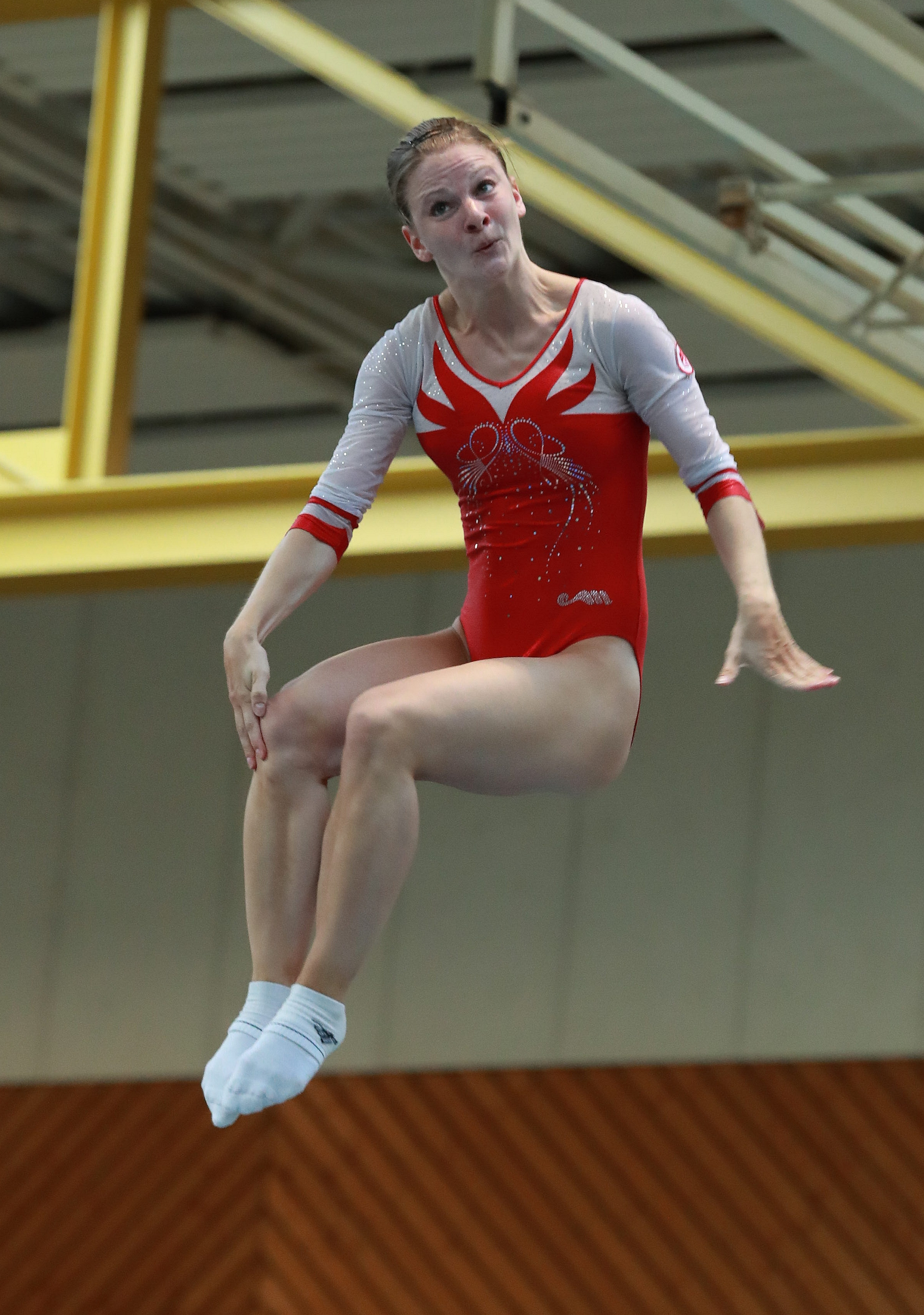 Wettkampf 9 Elite weiblich Erwachsene 2001 und älter Finale beim 9. Internationalen Filder Pokal im Trampolinturnen 2018 in Ruit. Abgebildet: Leonie Adam.